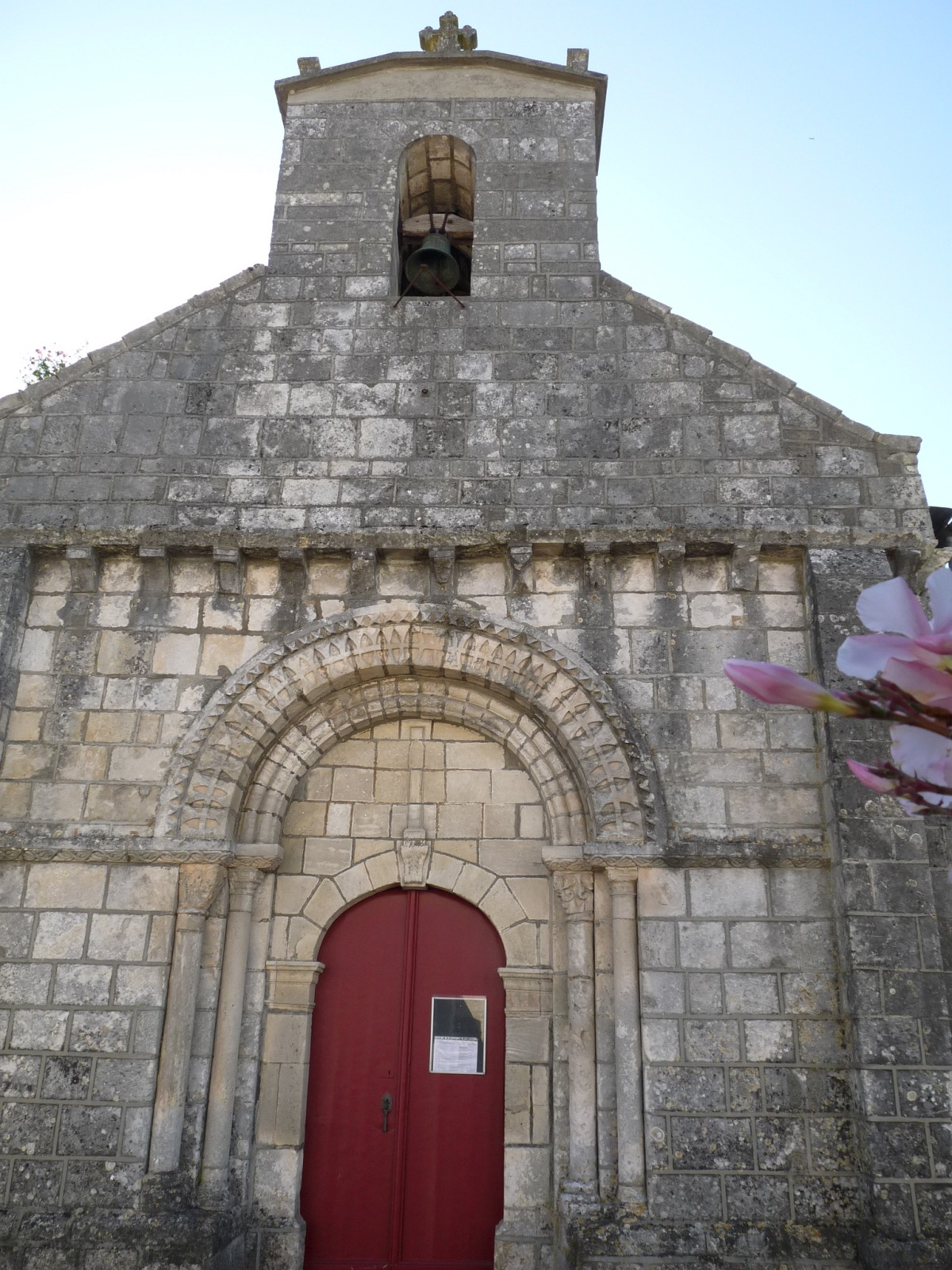 Eglise de Celles, Charente-Maritime, France